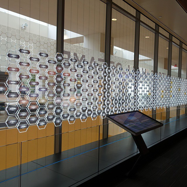 発明者を検索し、情報を見ることができるシステム。 USPTO